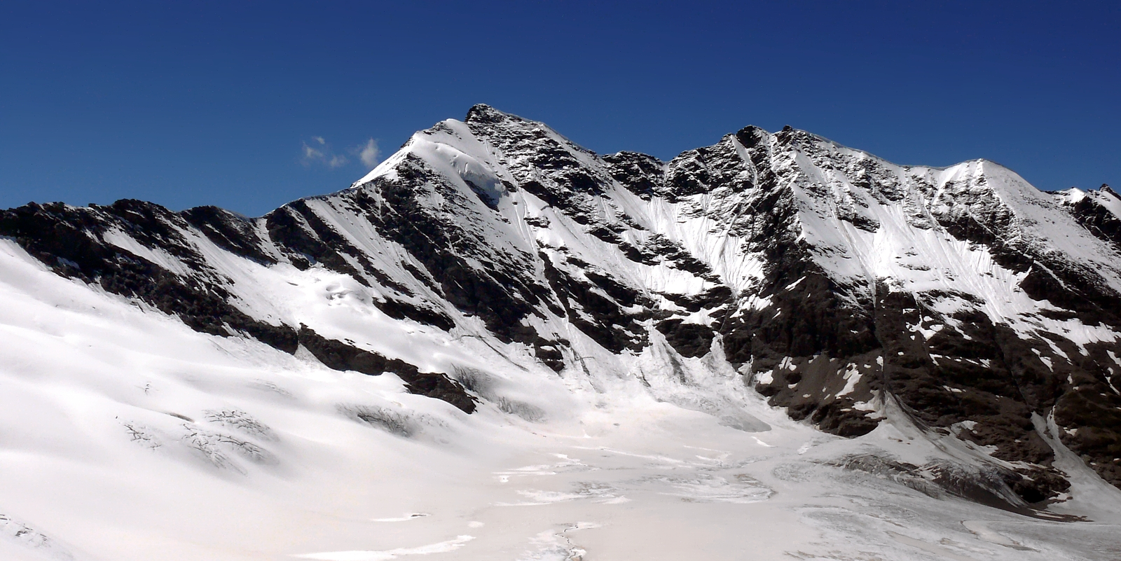 D:\WIKI\Sassiere 002.jpg - Alpi Graie - Italy